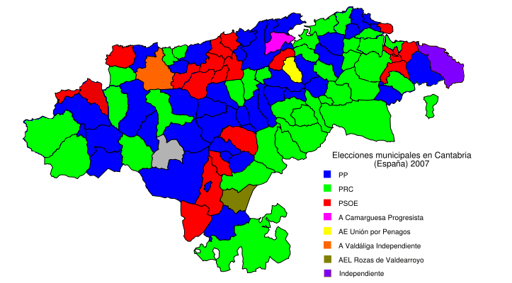 Mapa de los alcaldias de los municipios de Cantabria tras las elecciones municipales de 2007